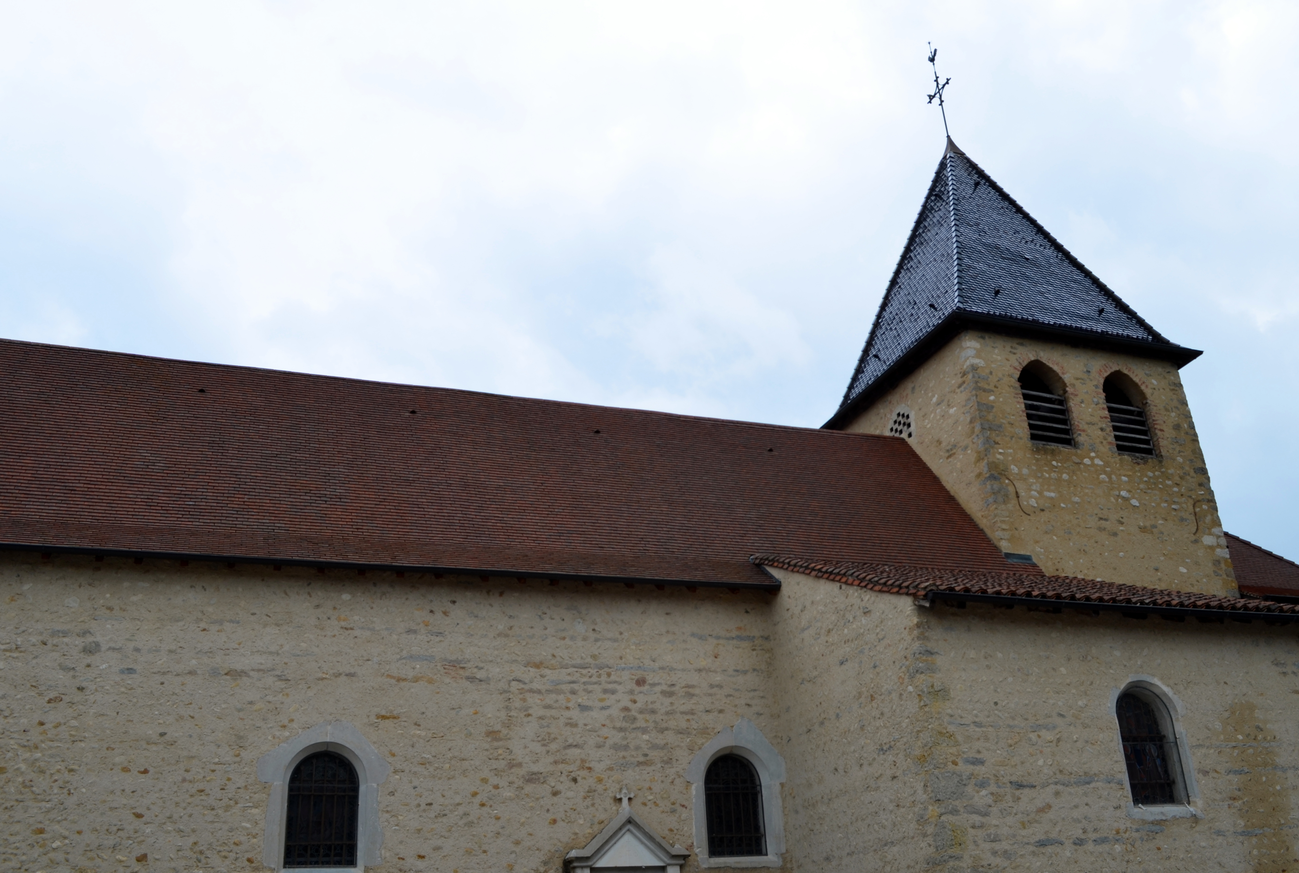 L'église de Leyment.